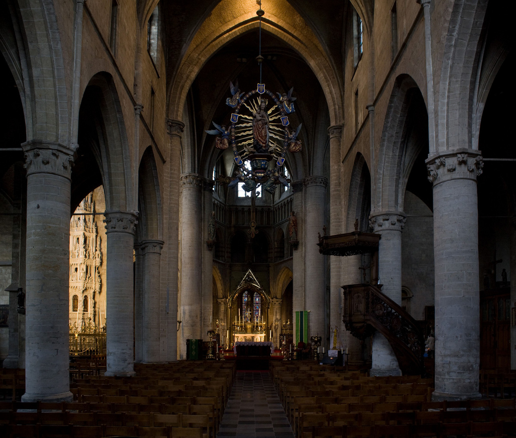 De Sint Leonarduskerk te Zoutleeuw